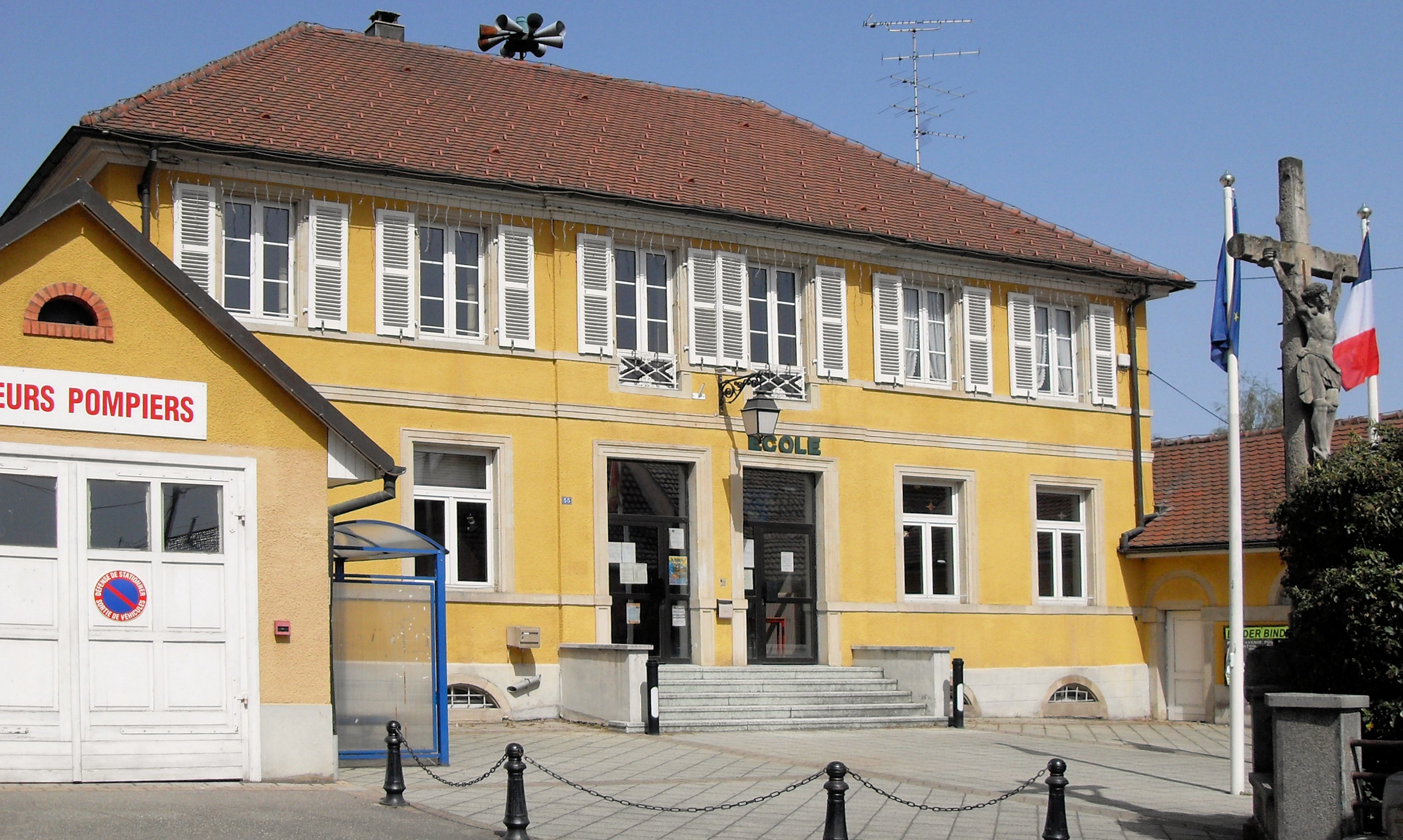 L'école à Traubach-le-Bas